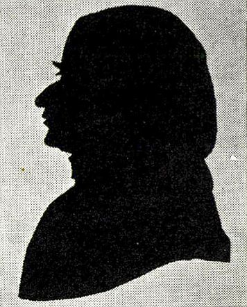 Silhuett av gårdbruker og eidsvollsmann Anders Eriksson Lysgaard (1756-1827) fra Biri.